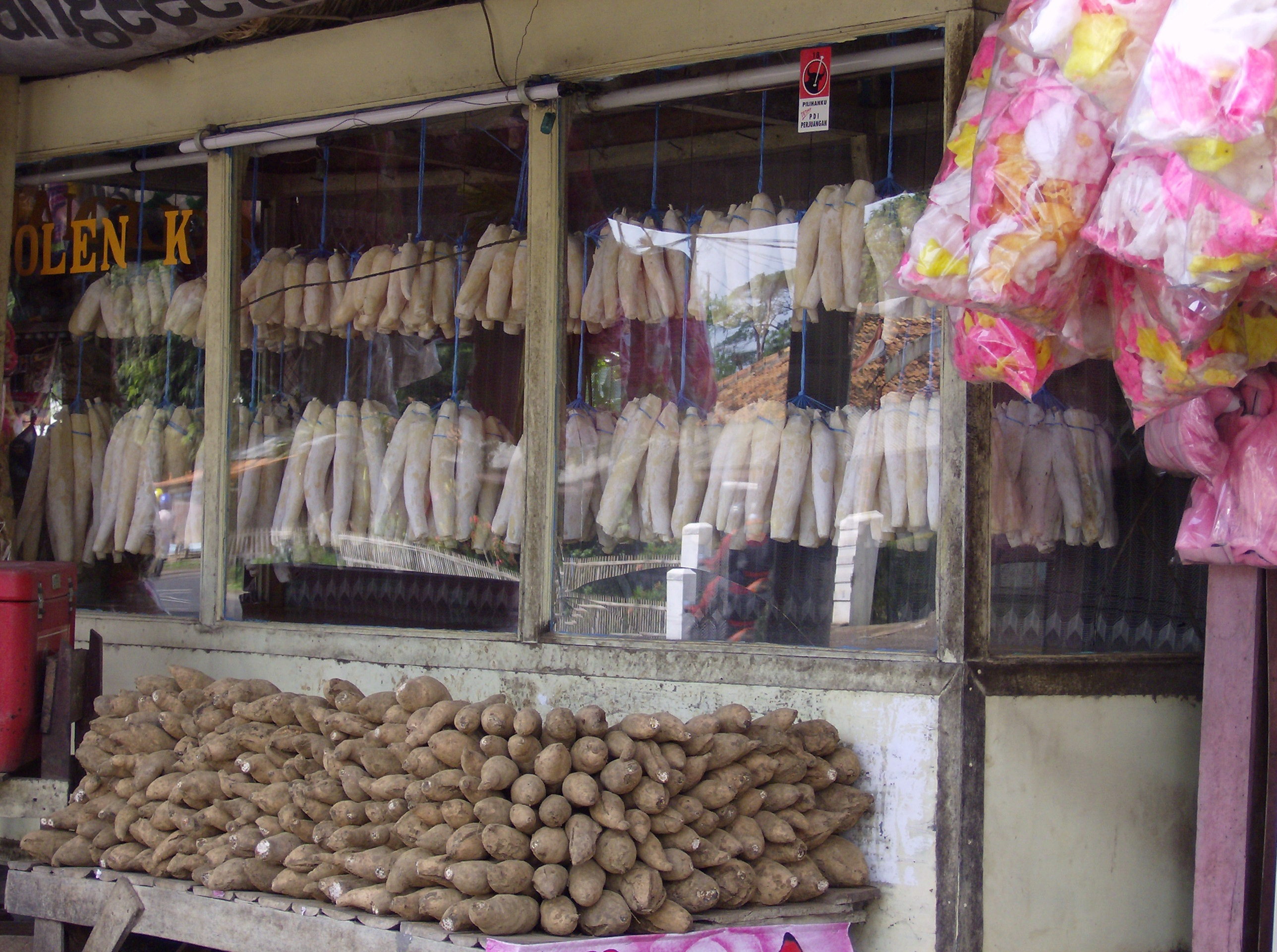 Made by Meursault2004 aka Revo Arka Giri S.